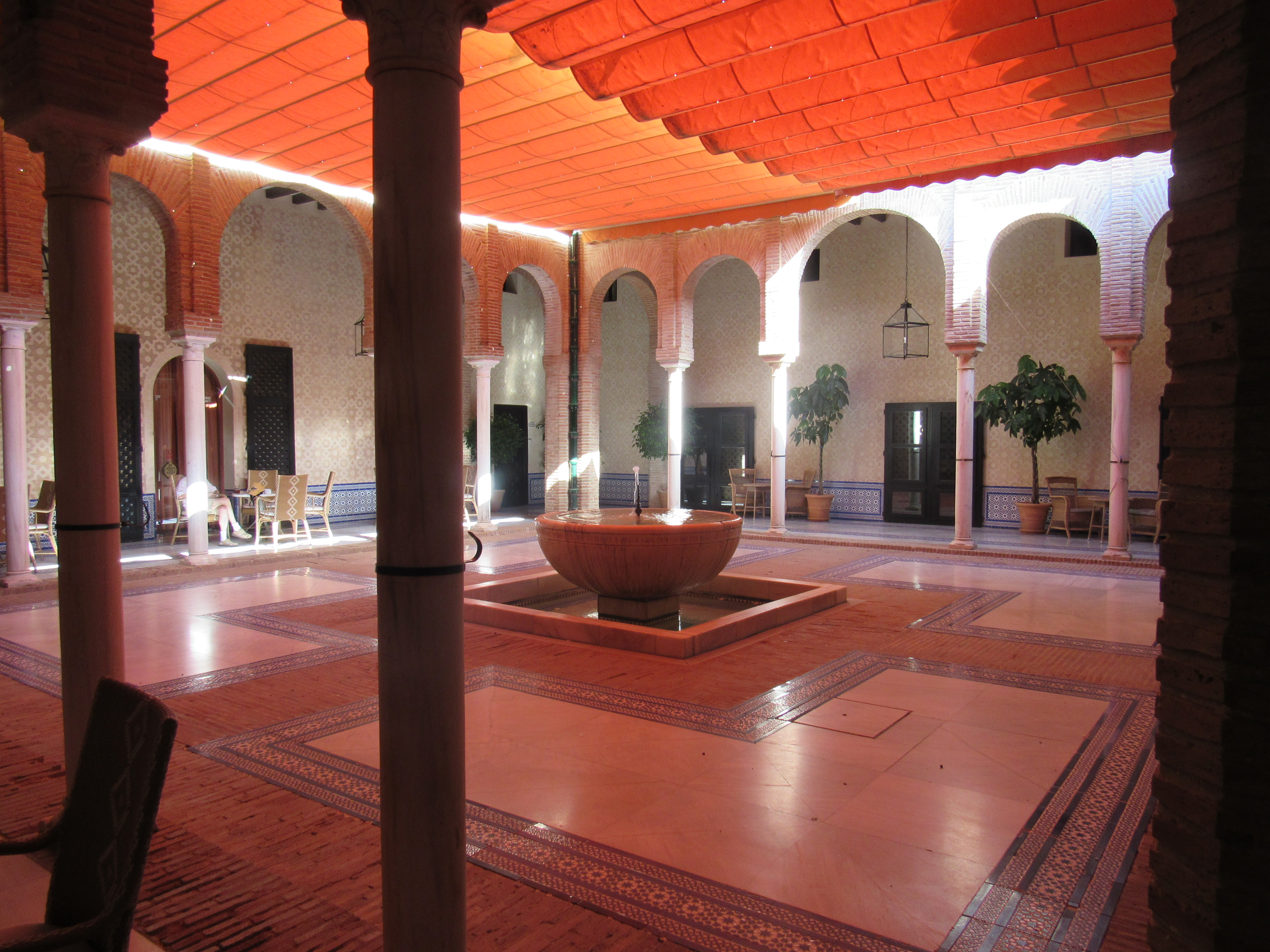 Patio en el Alcázar del Rey Don Pedro de Carmona, provincia de Sevilla, Andalucía, España.